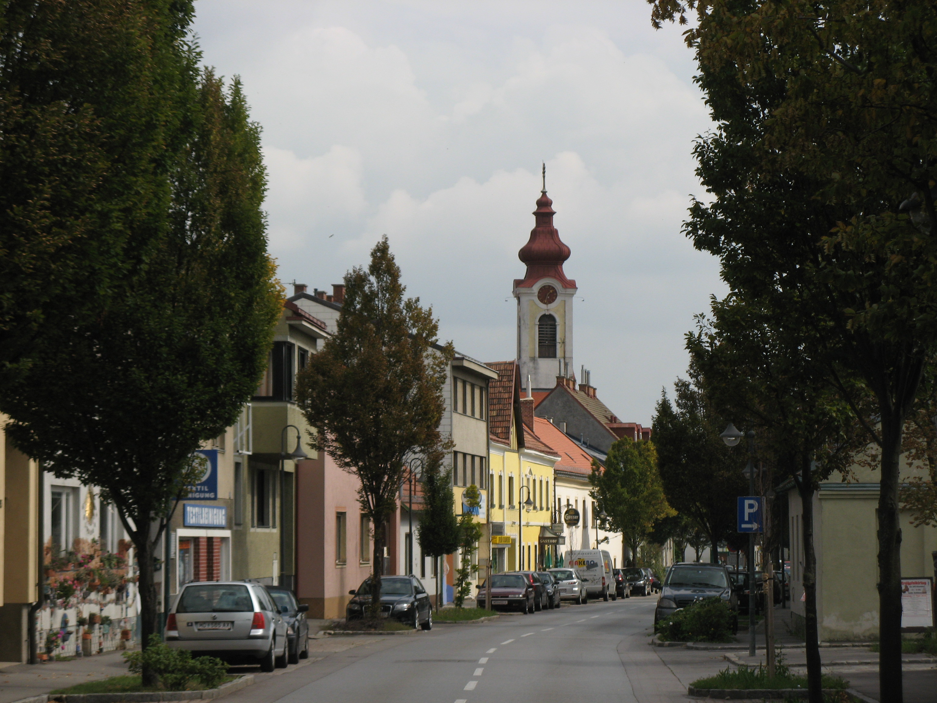 Ortsstraße, Vösendorf, Niederösterreich